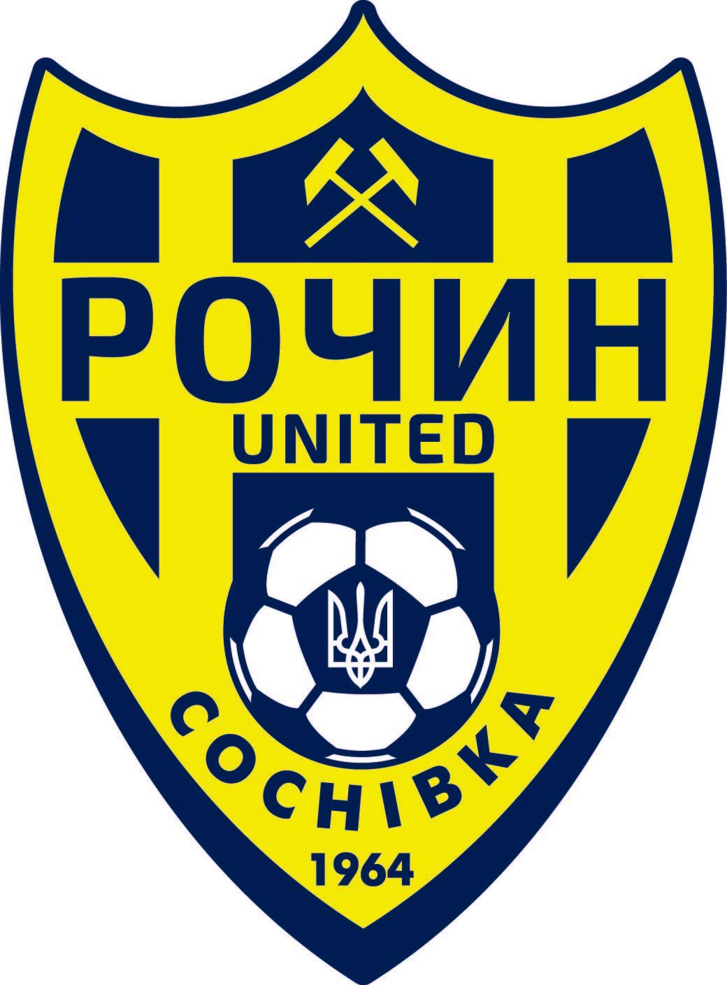 Логотип ФК Рочин Соснівка з 2017 року